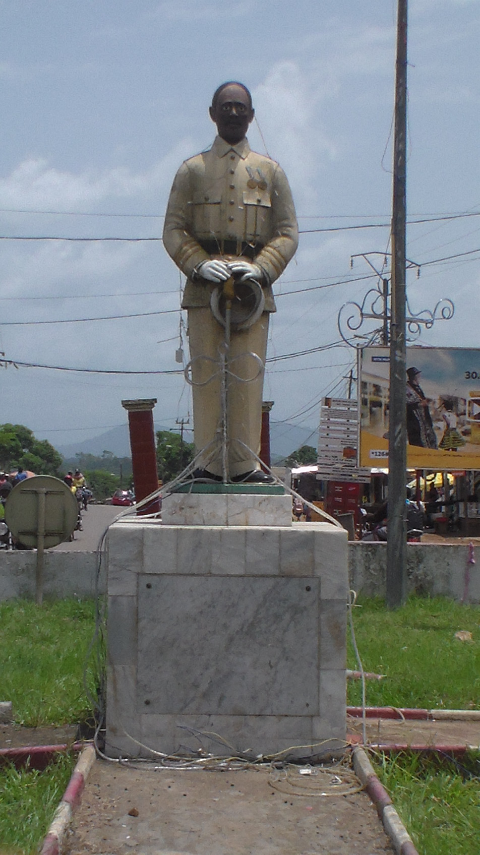 La place du monument Martin Paul Samba à Ebolowa